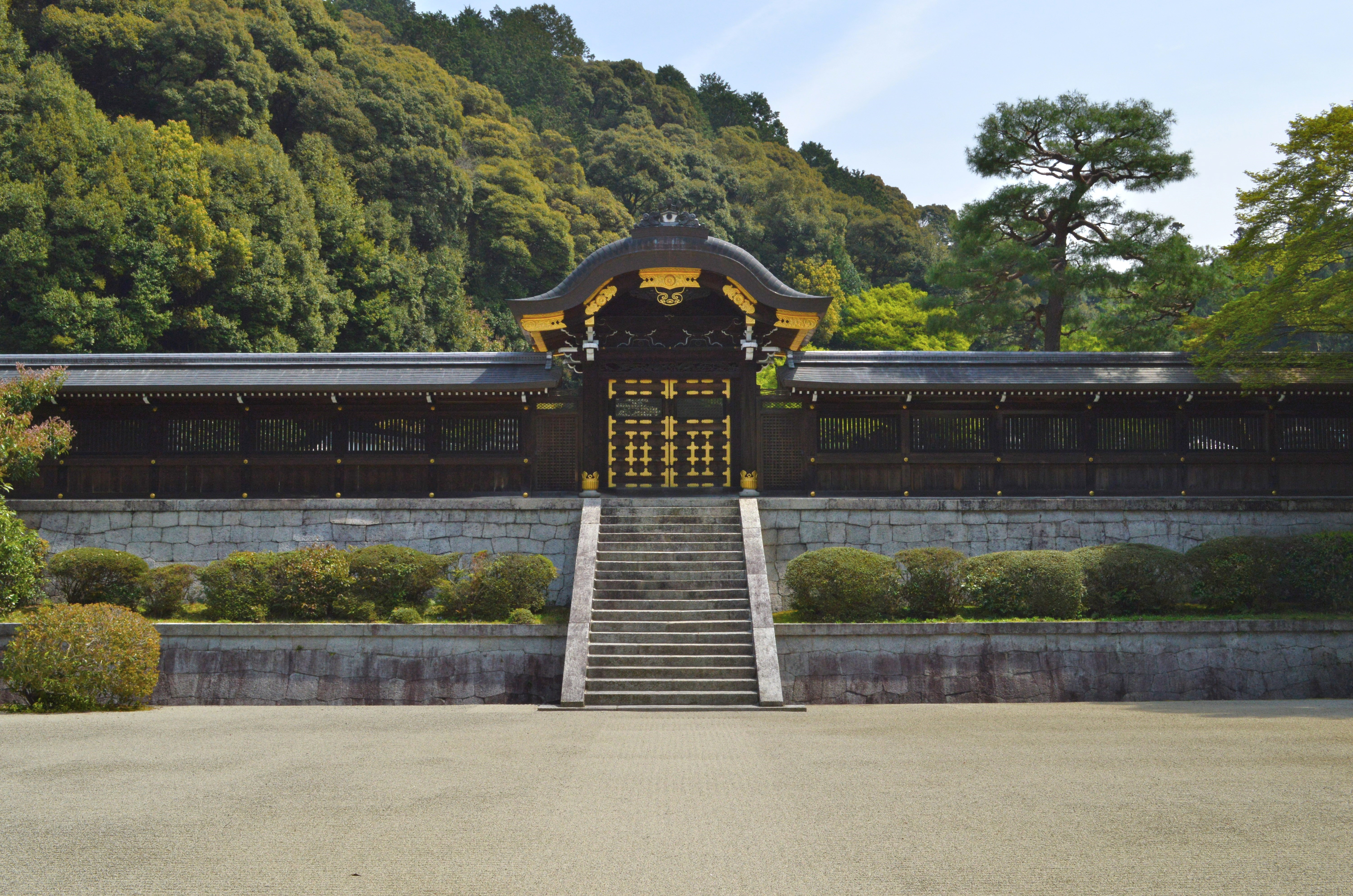 泉涌寺 月輪陵拝所